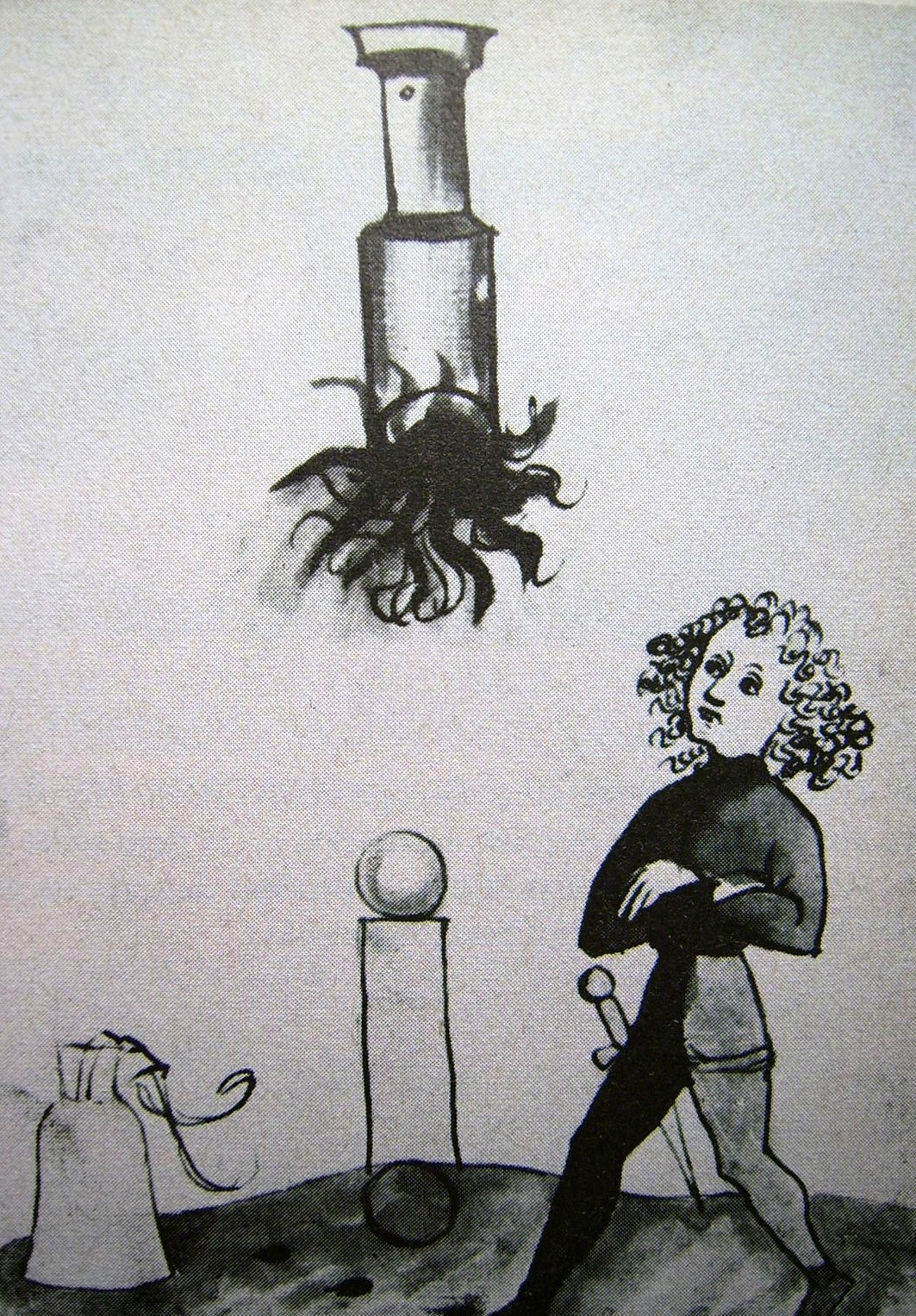 Geschützprüfung im 15. Jahrhundert. Das Geschützrohr wurde über eine auf einem Pfahl liegende Kugel gestülpt. Es wurde geprüft, ob das Rohr die Zündung des Pulvers übersteht. Bei dieser Prüfung muss das Rohr eine viel größere Masse (die eigene) beschleunigen, als bei der späteren Verwendung.